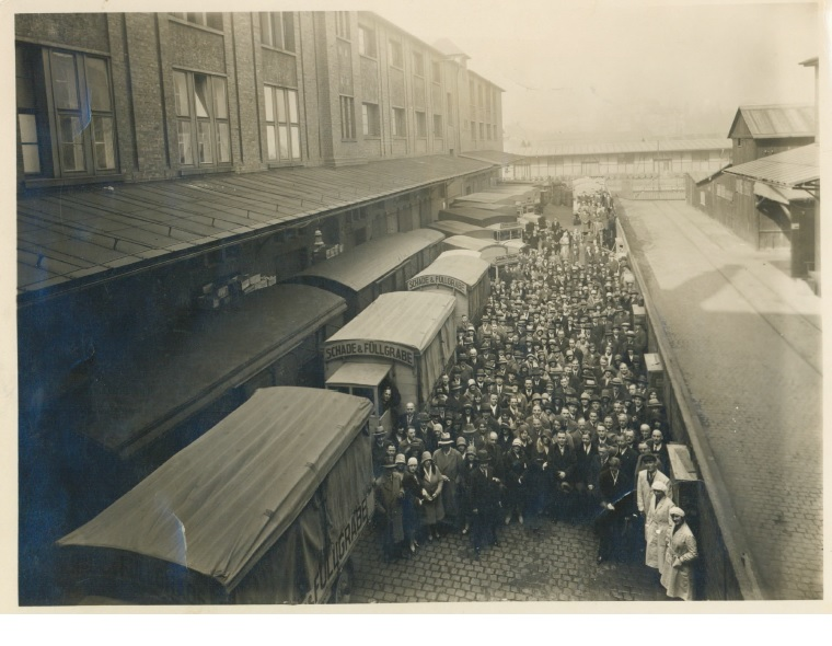 Firmenportrait Schade & Füllgrabe am Stammsitz in Frankfurt um 1935